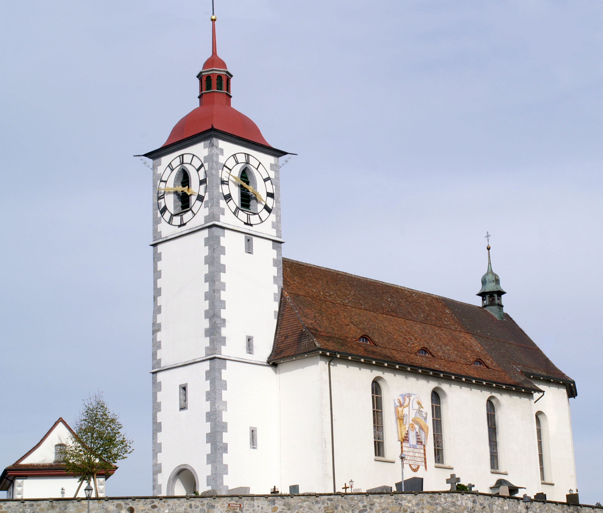 Kirche in Neudorf LU / Church of Neudorf LU